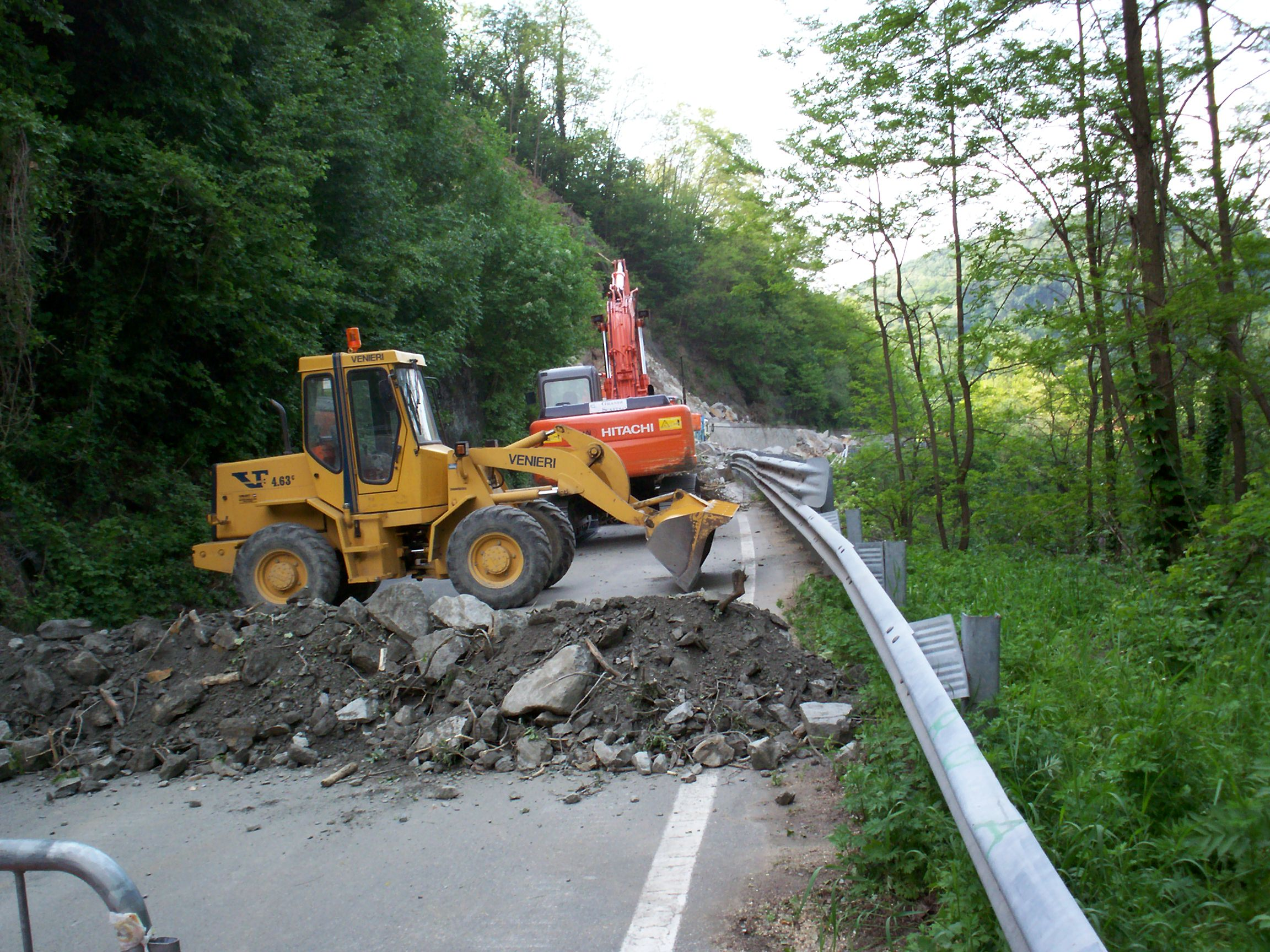 Turchino: una pala impiegata in un cantiere stradale per la rimozione di materiali franati.